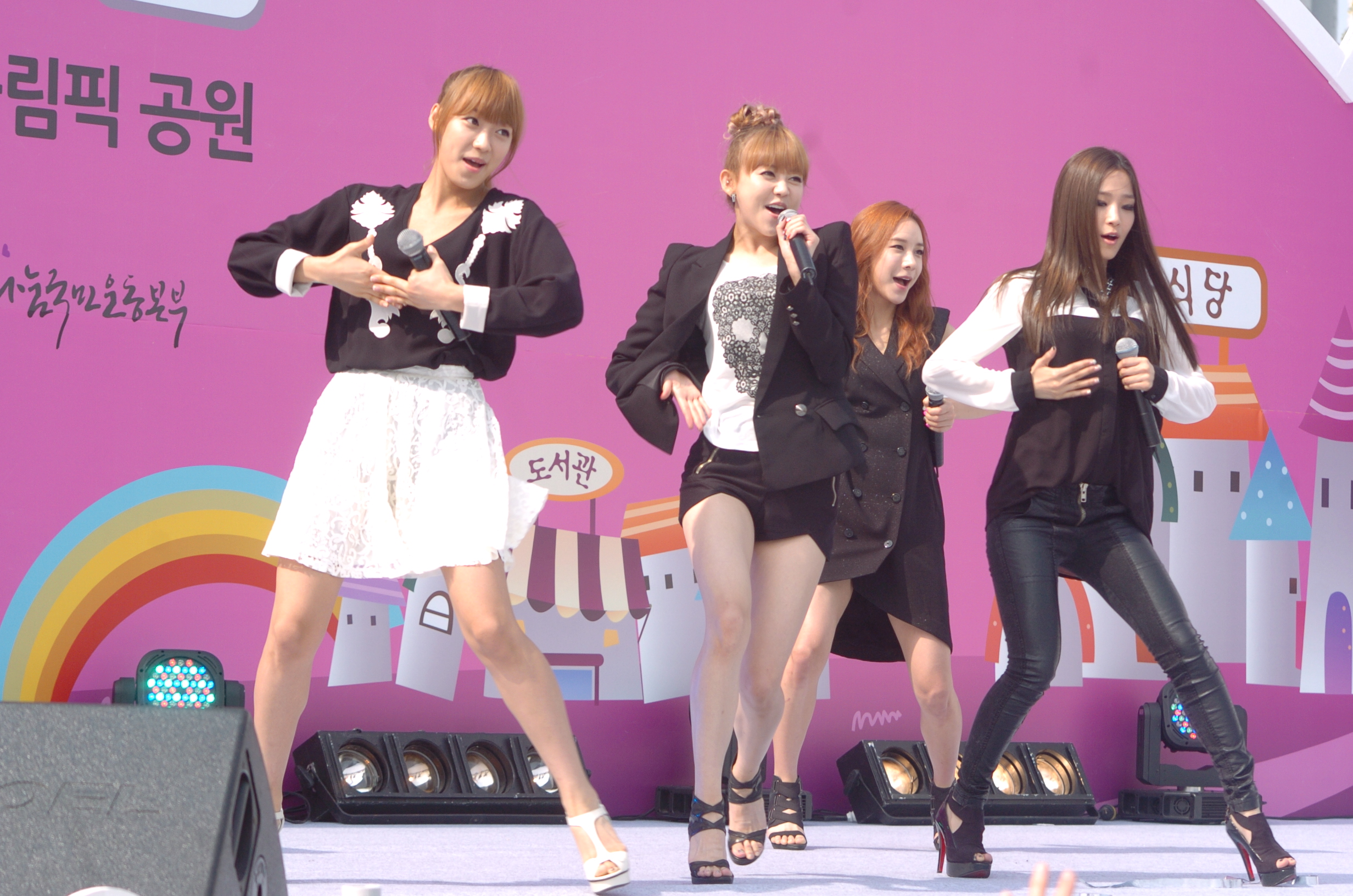 투엑스 (제3회대한민국나눔대축제)